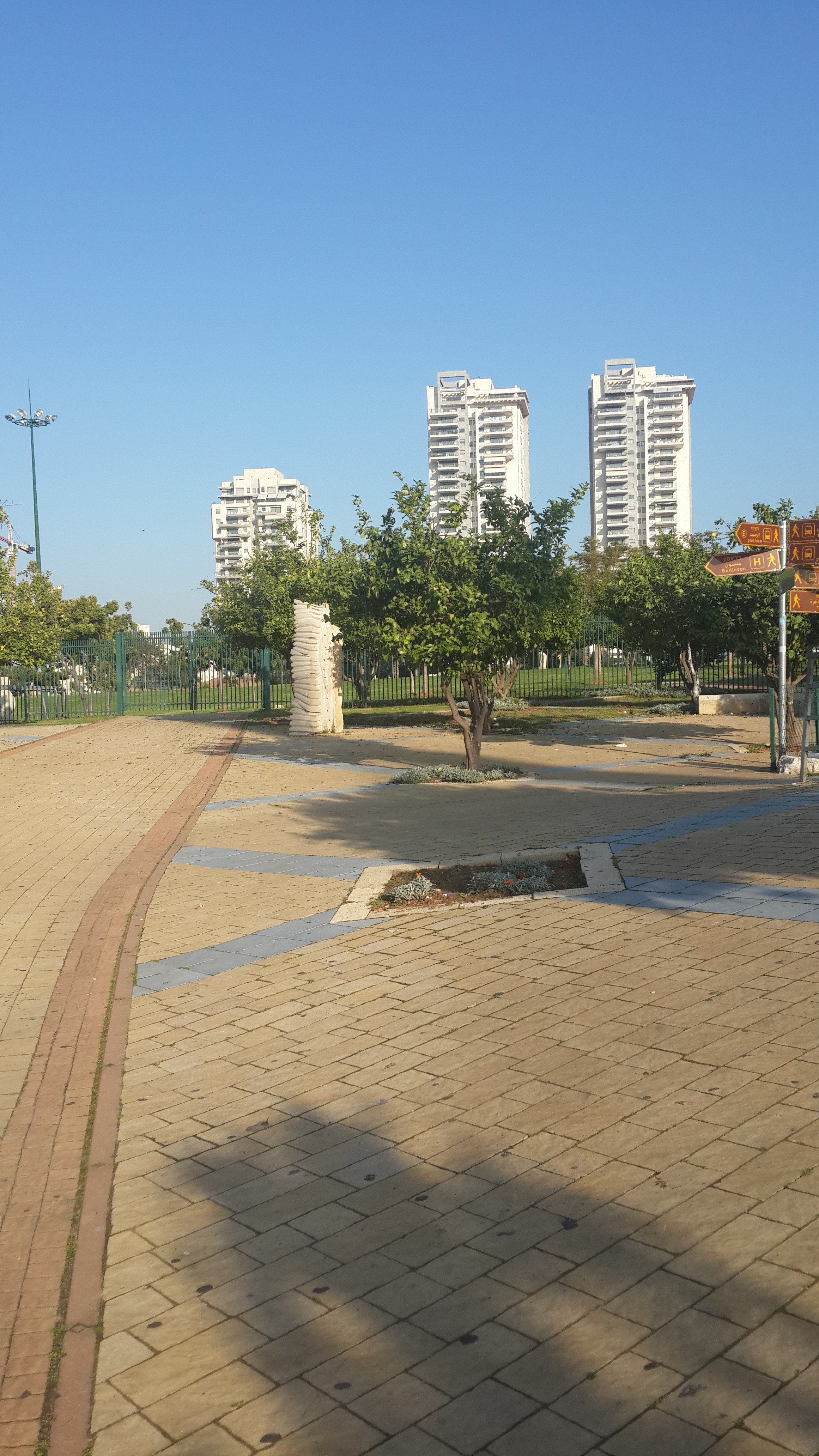 הפארק הגדול הפונה אל שכונת נווה גן